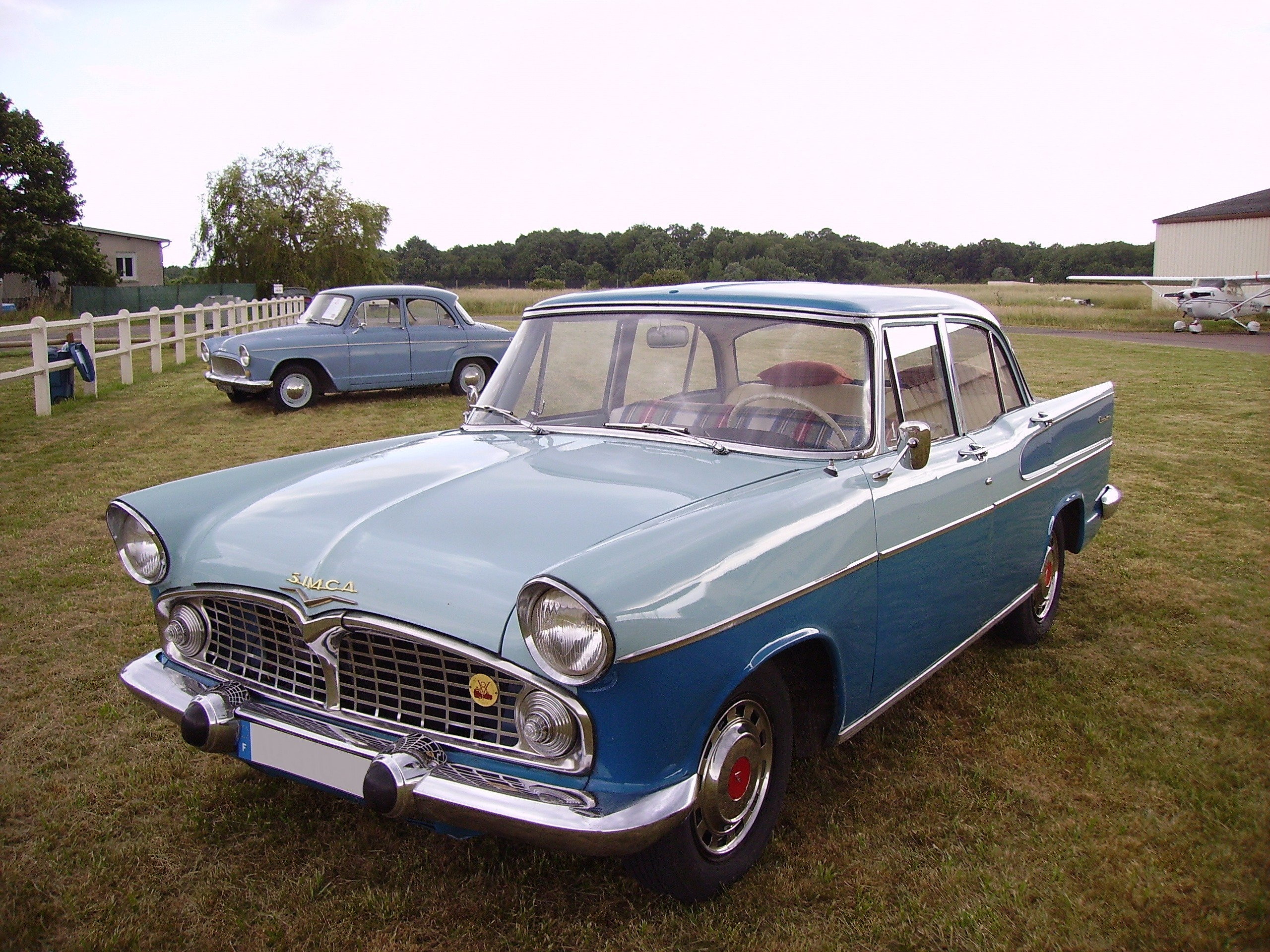 Simca Chambord (à droite) et Simca Aronde P60.